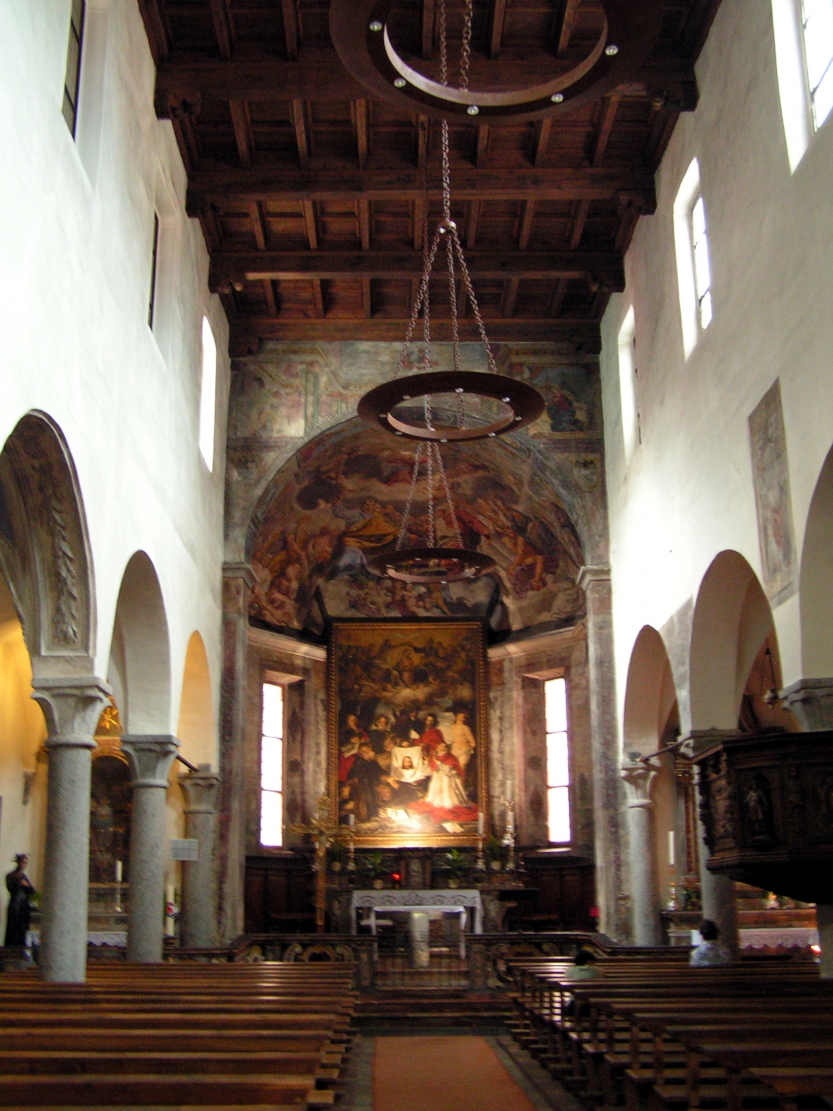 Piazza San Pietro 4, Ascona. Intérieur de l'église de Pierre et Paul.